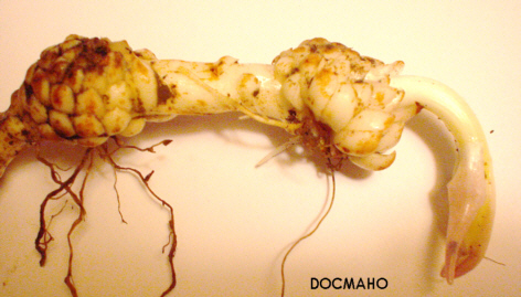 Lilium canadense bulb